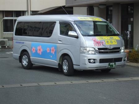 神埼市巡回バスの画像です